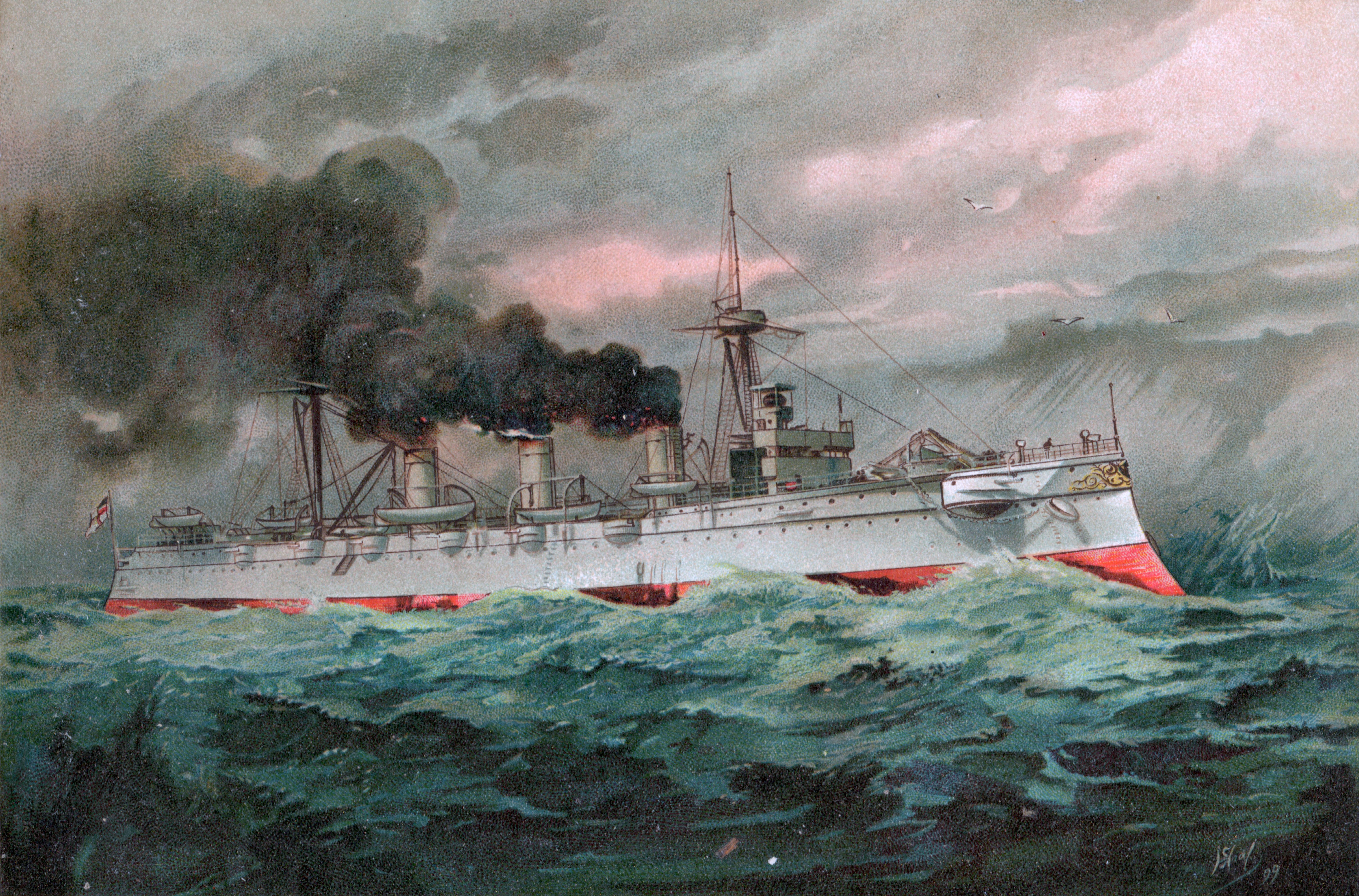 S.M. Großer Kreuzer Kaiserin Augusta.